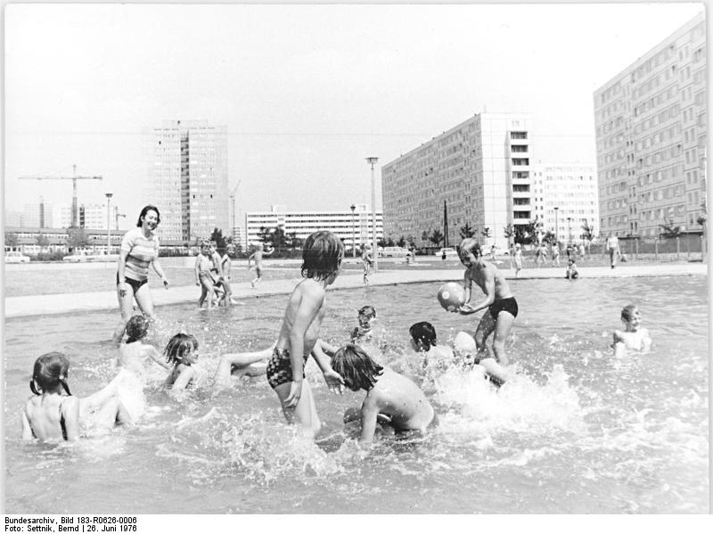 ADN-ZB-Settnik 26.6.76 Berlin: Willkommener Tummelplatz in diesen heißen Tagen ist für kleine und auch etwas größere Kinder das Planschbecken im Neubauviertel Mellenseestraße im Hans-Loch-Viertel. Information added by Wikimedia users.